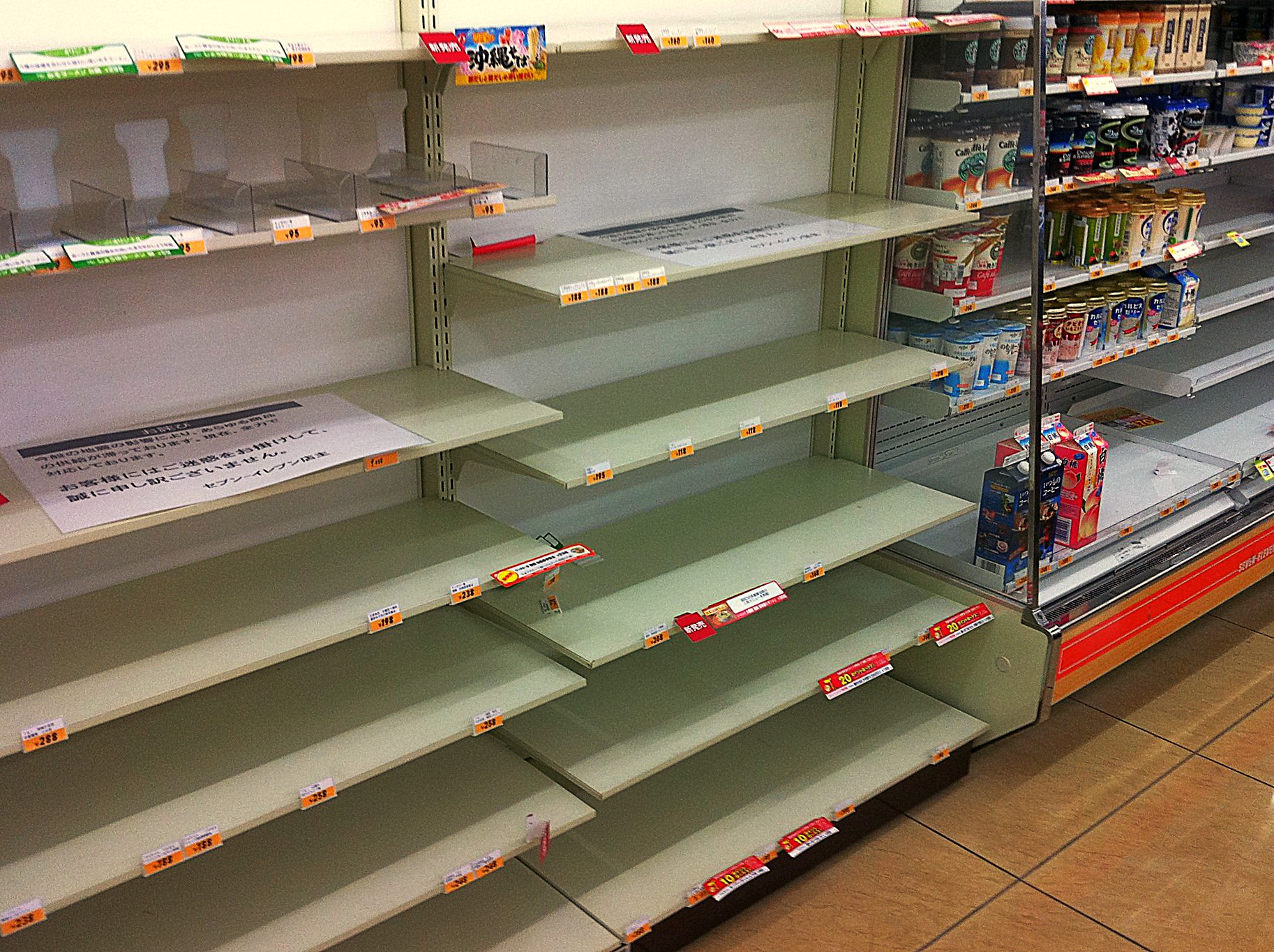 東日本大震災 足立区内 コンビニエンスストア（セブンイレブン） 2014年3月11日の状況。